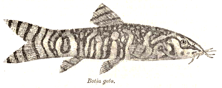 Botia geto = Botia dario (Hamilton, 1822)